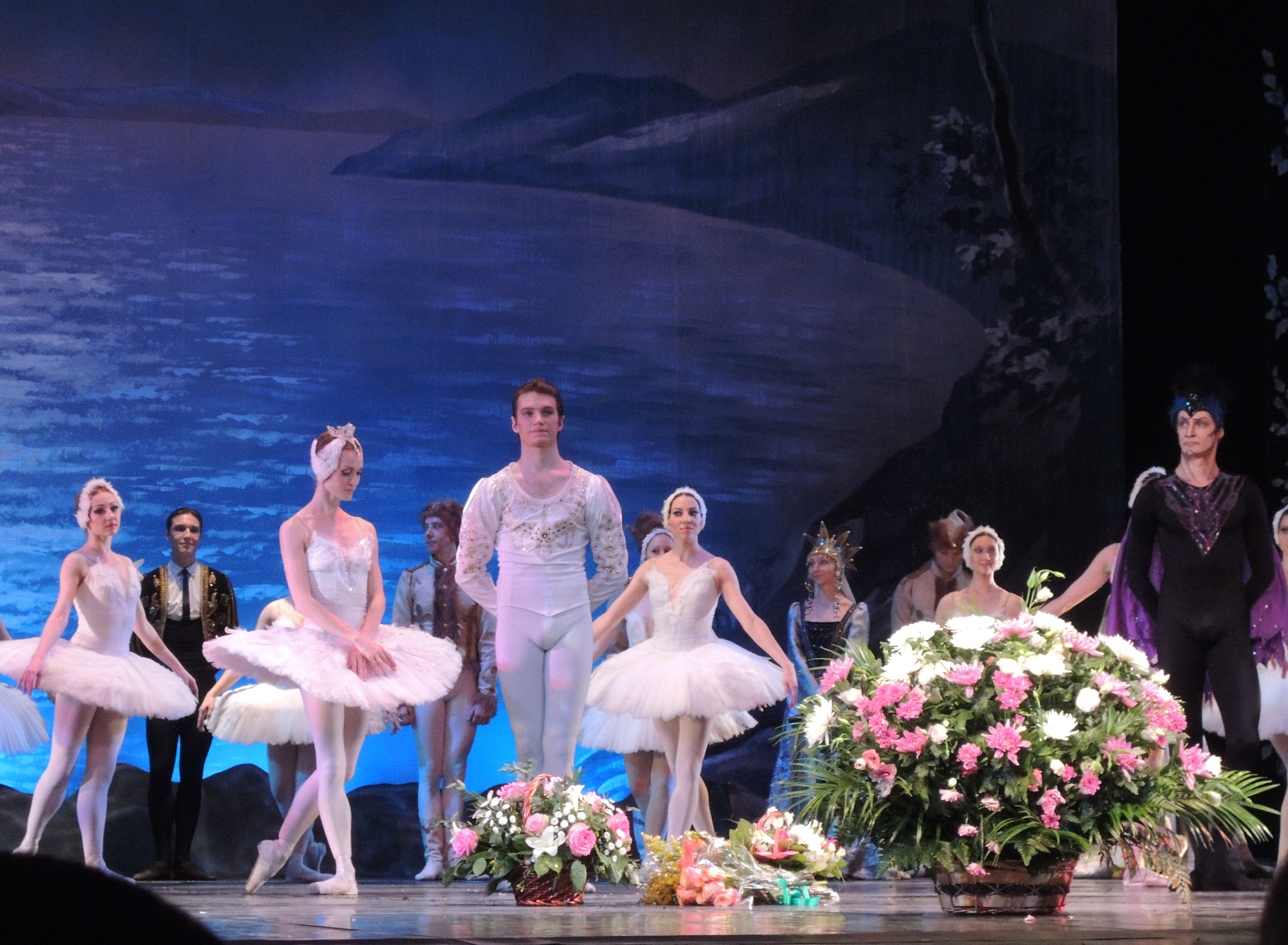 RAMT - Swan lake by shakko